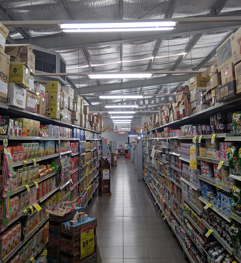 Lorong supermarket Superindo, Malang, Jawa Timur